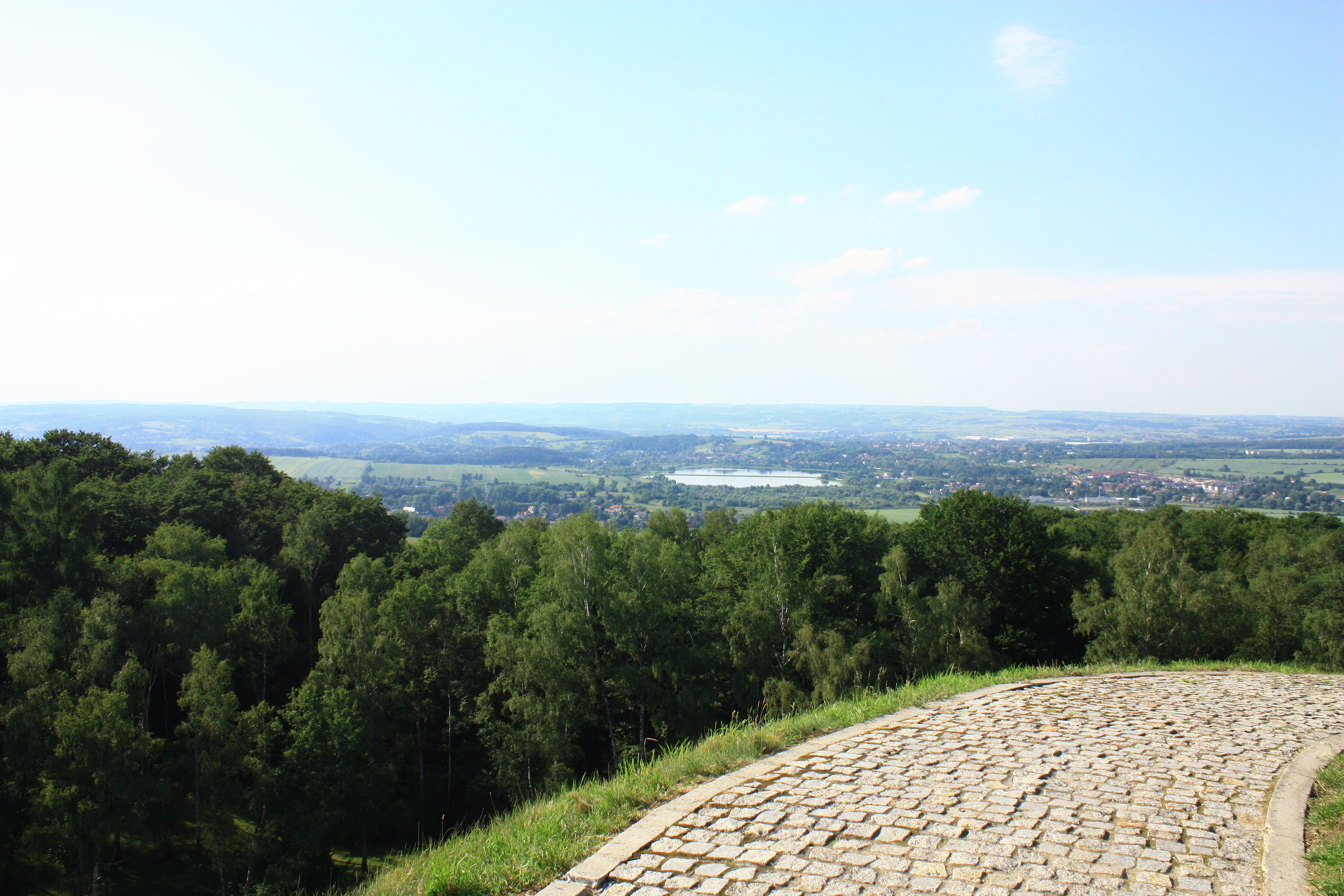 Kraków, Kopiec Józefa Piłsudskiego (na Sowińcu), 1934-1937